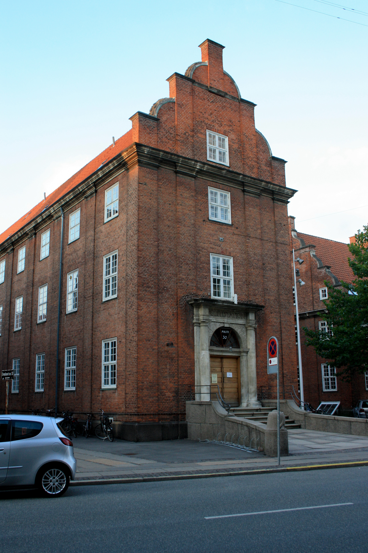 Frederiksberg Domhus